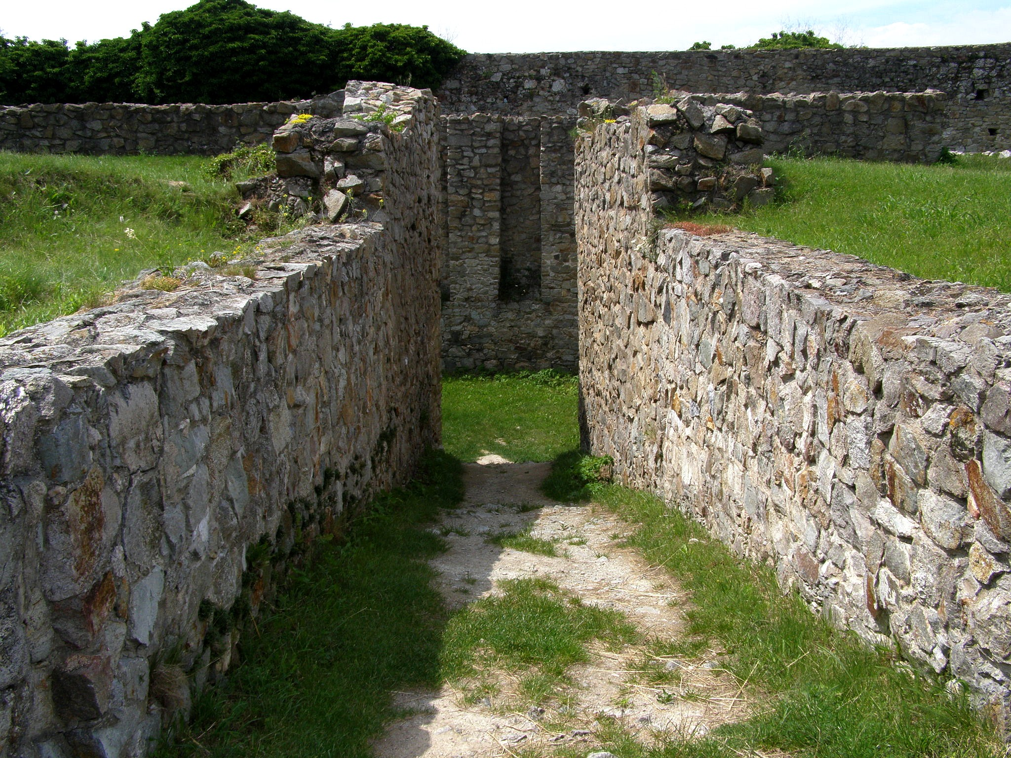 Zachované murivo muničného skladu zo 17. storočia